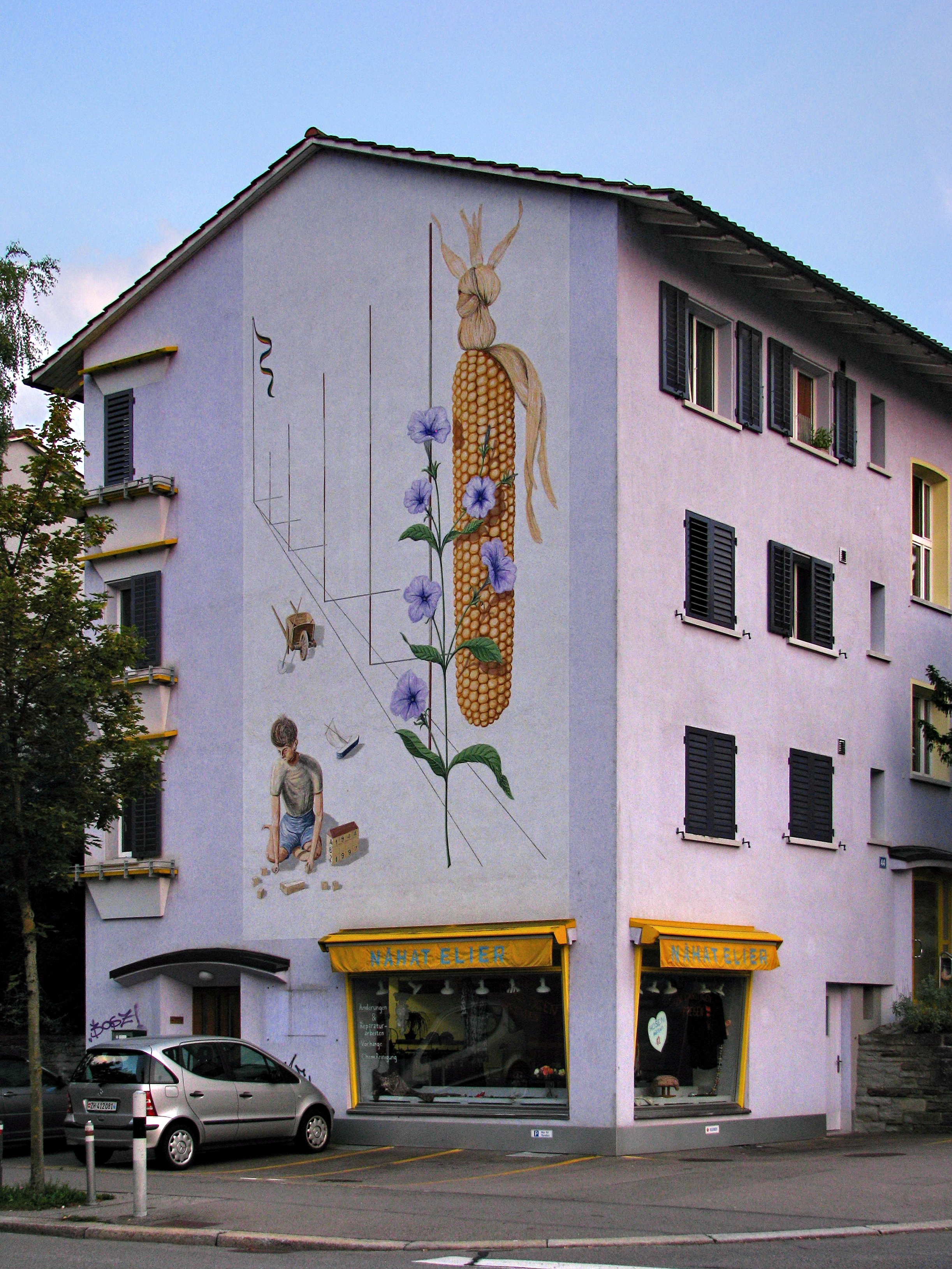 Apartment building in Zürich-Oerlikon at Regensberg-/Oberwiesenstrasse (Switzerland)